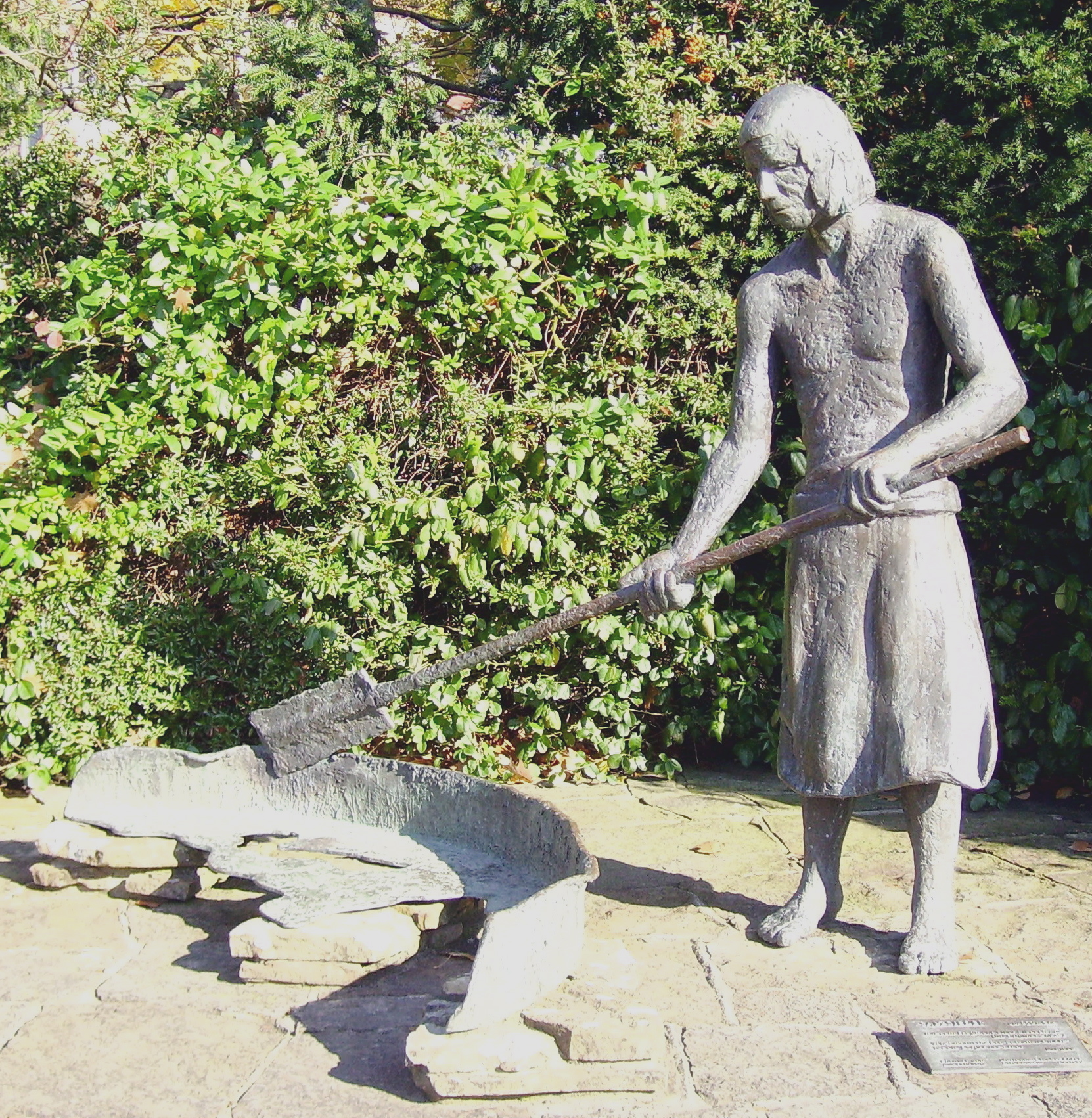 Salzsieder um 800 v. Chr.